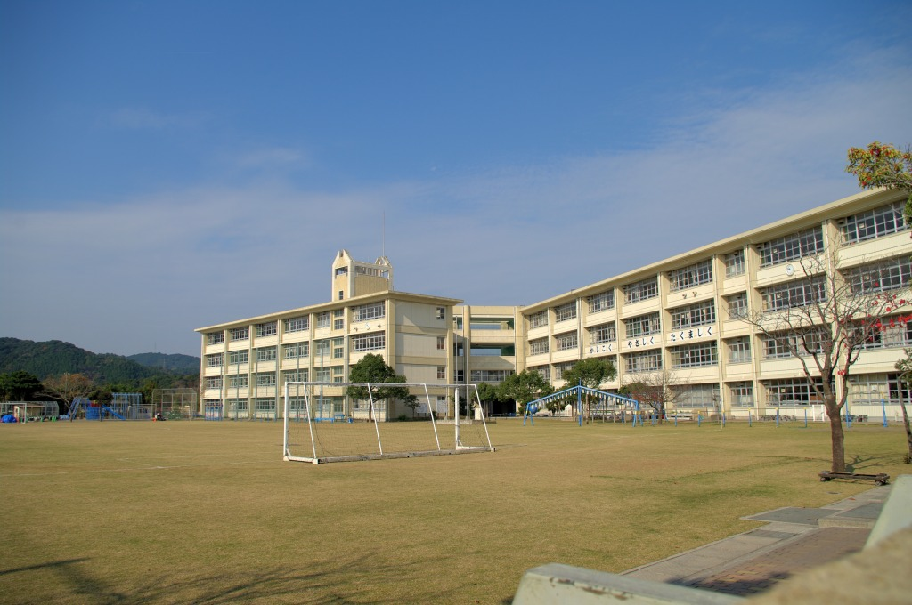 鹿児島市立皇徳寺小学校の外観。